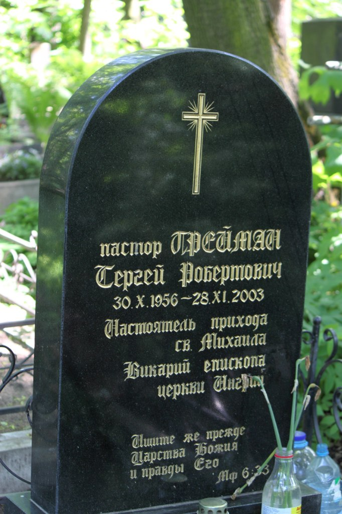 Lutheran cemestry in S-Peterburg (Russia). Tomb of pastor Sergei Preiman